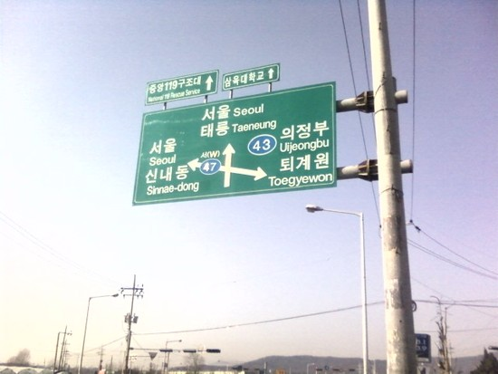 Gurl's GalMaeDong 4 street is Seoul two way.